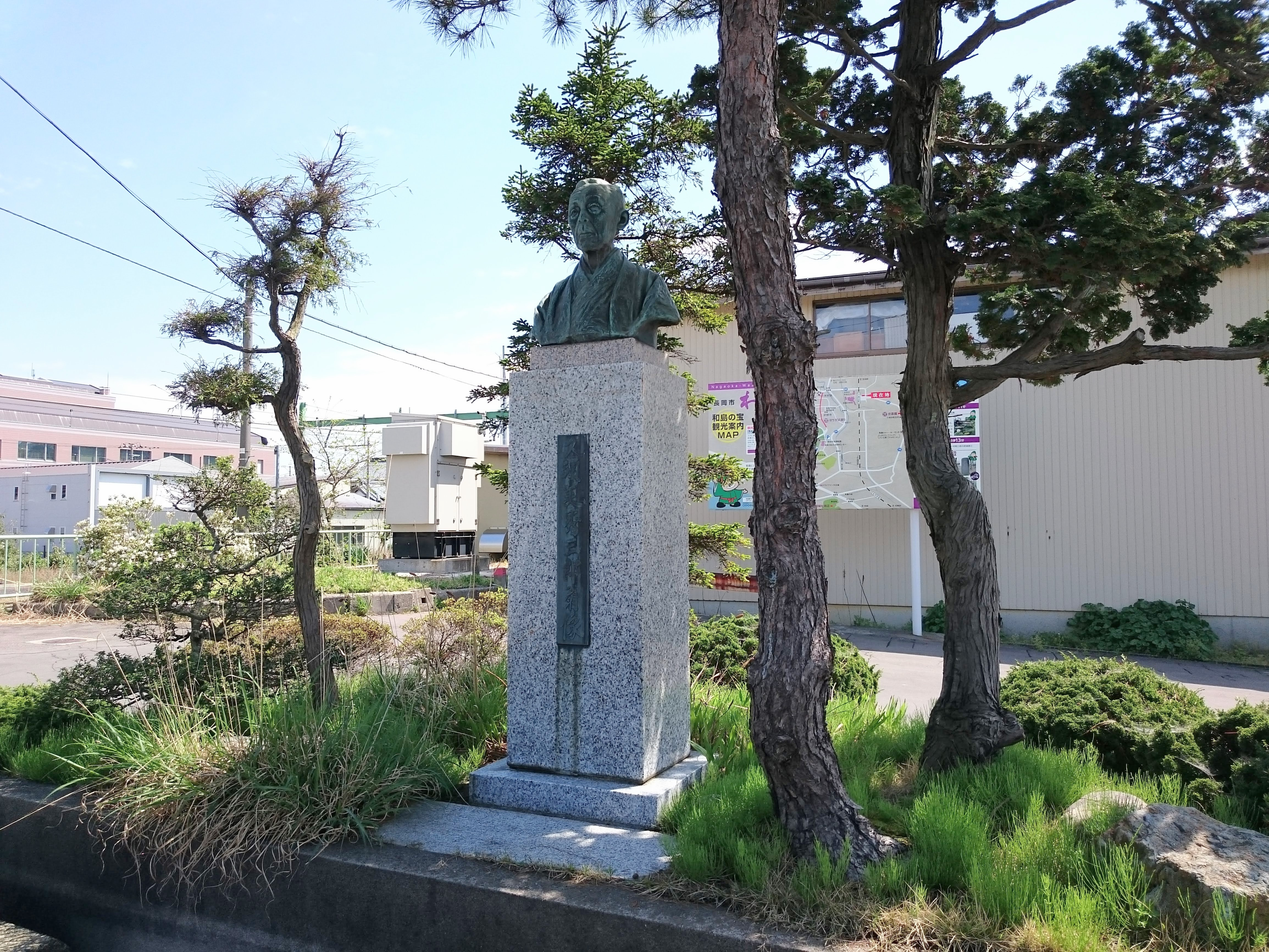 久須美 秀三郎の胸像（小島谷駅前にて）